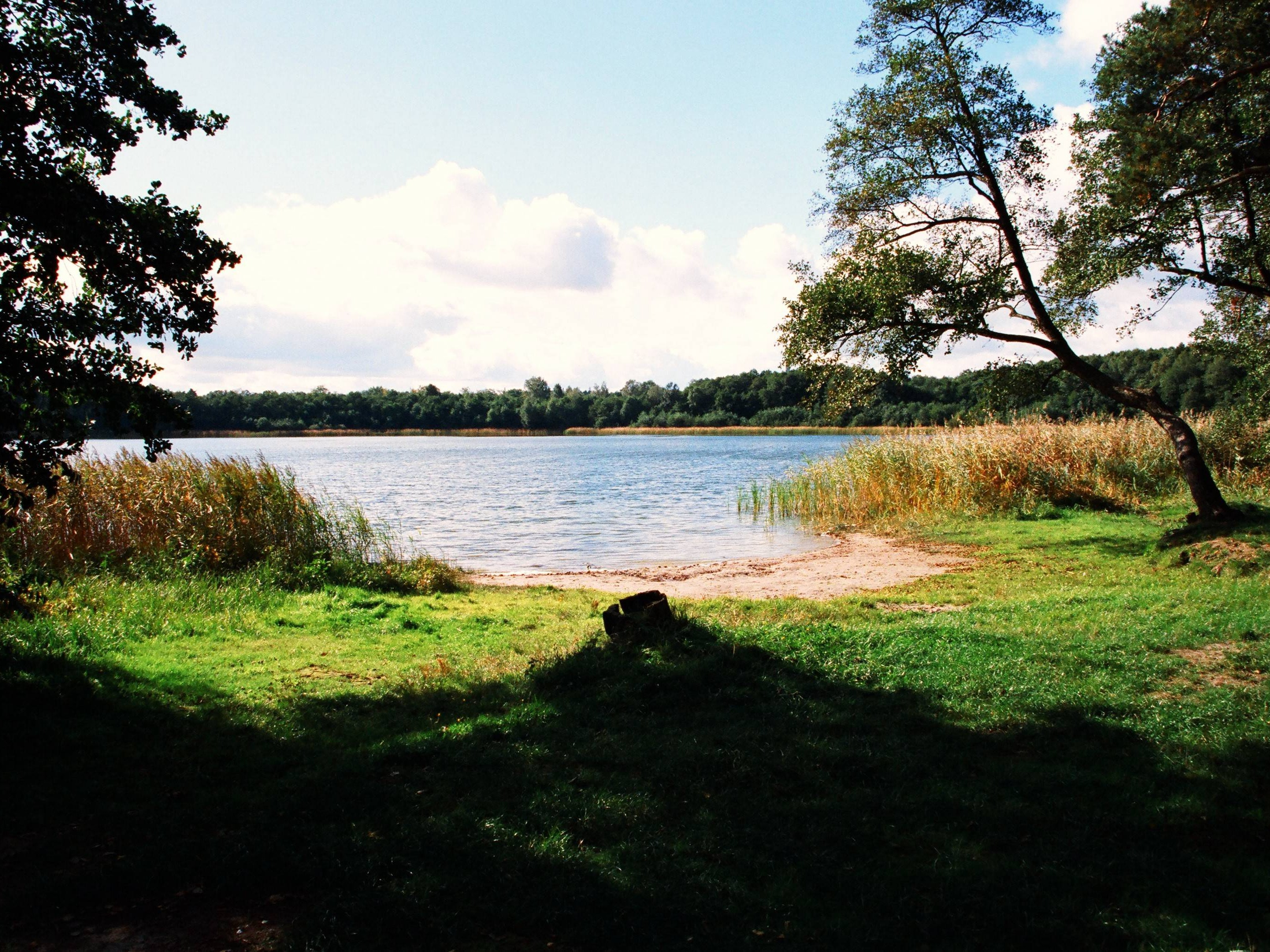 Gorinsee, Schönwalde (Barnim), Amt Wandlitz, Brandenburg (Deutschland)